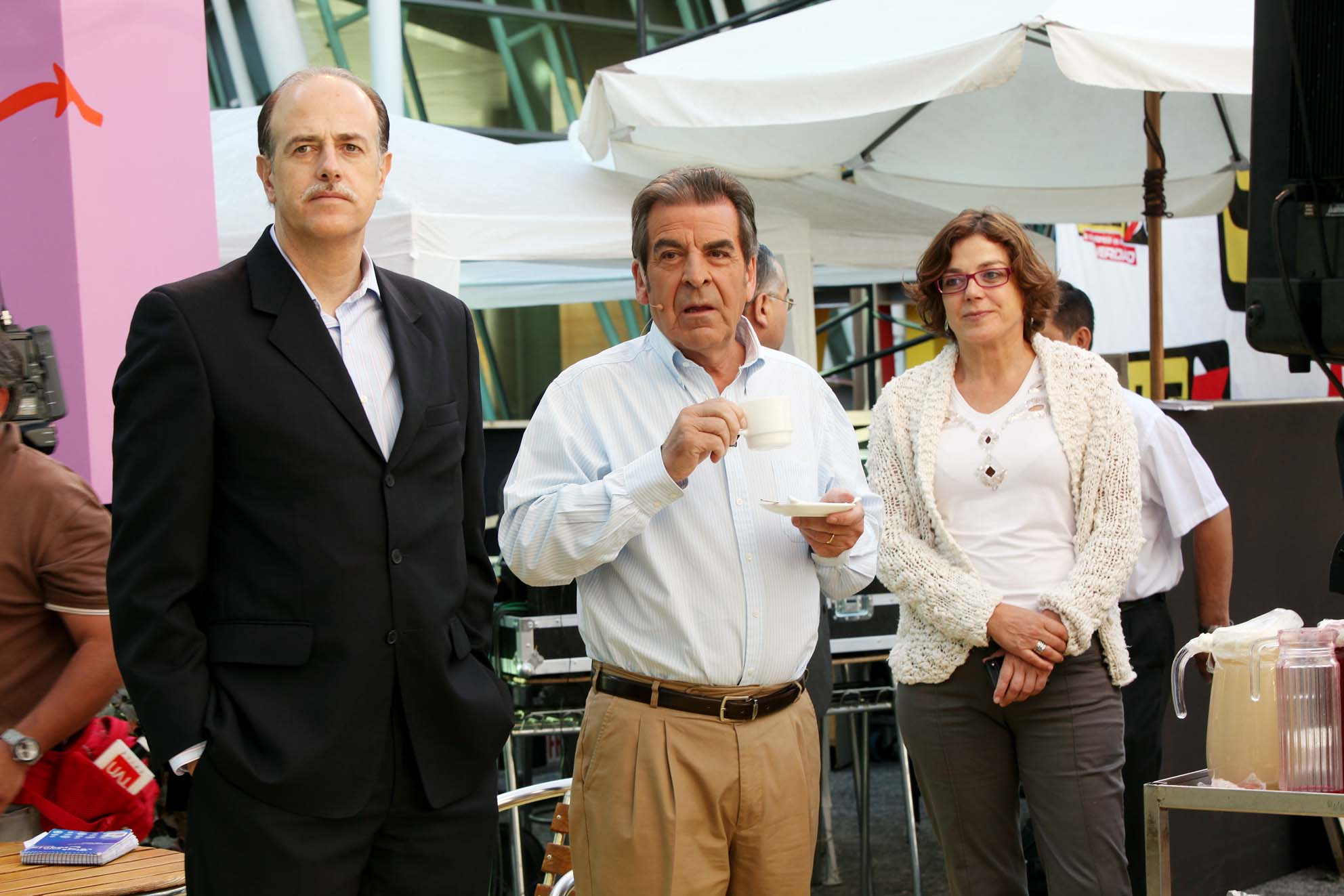 Daniel Fernández y Eduardo Frei.